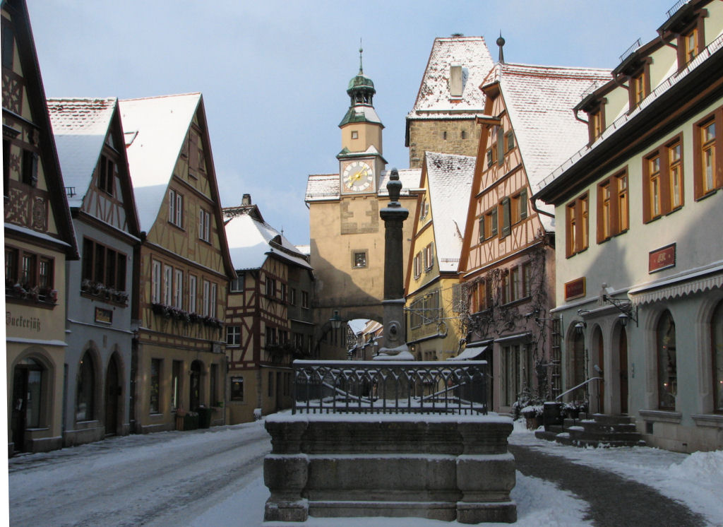 Markusturm mit Röderbogen (12./13. Jhdt.) in Rothenburg ob der Tauber.